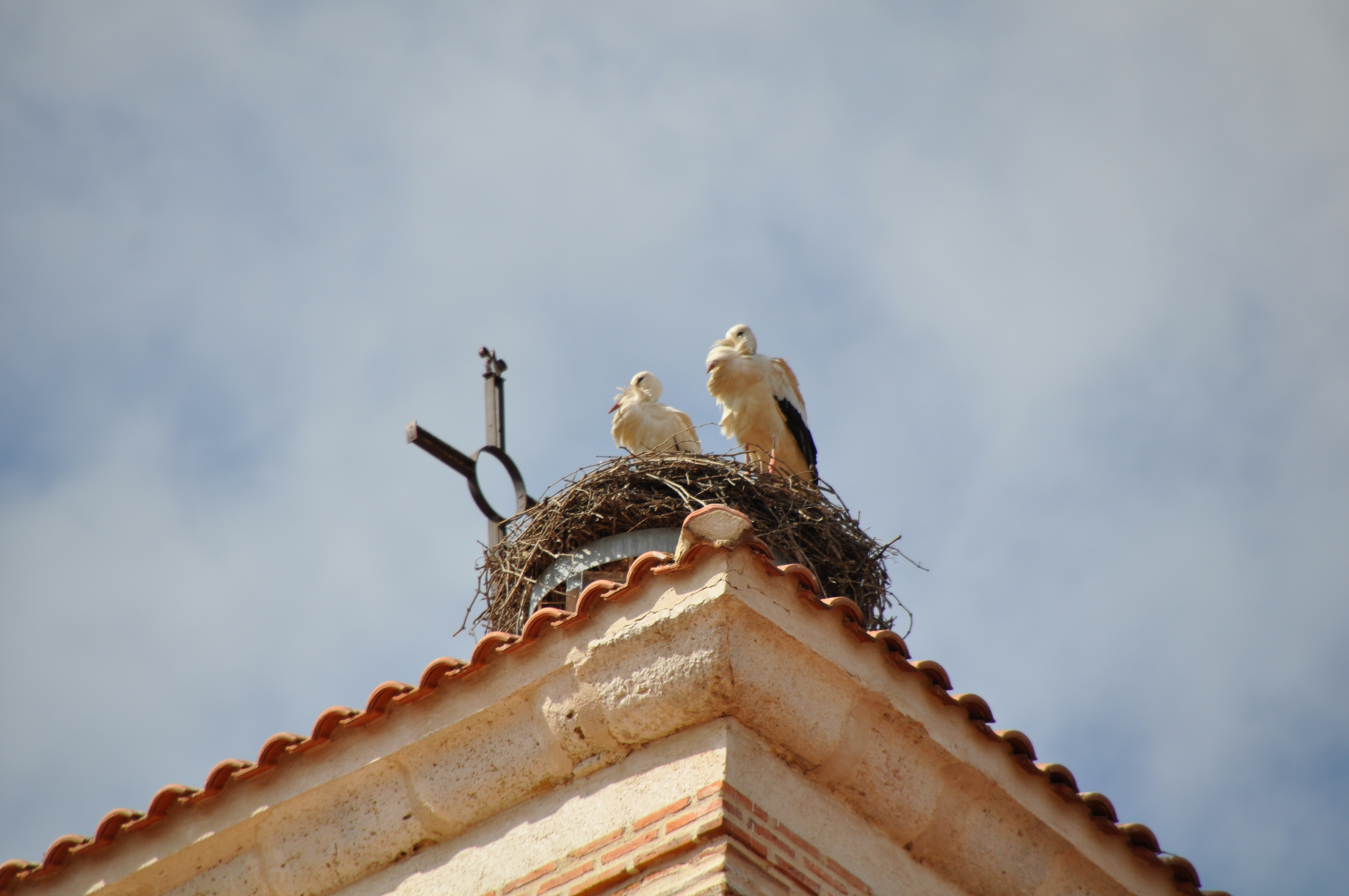 Cigüeñas en lo alto de la iglesia de Ventosa de la Cuesta, Valladolid (España).